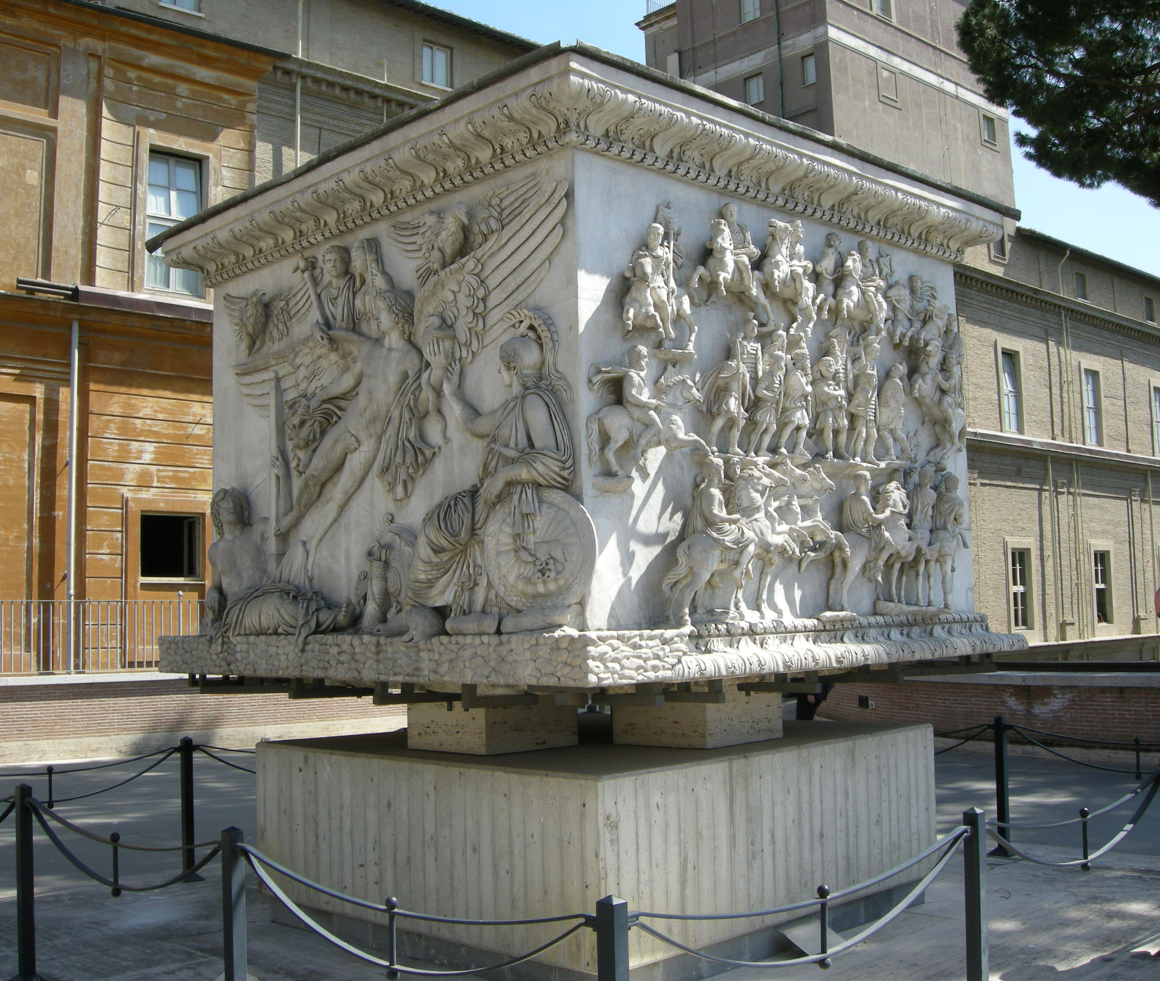 Base della colonna antonina